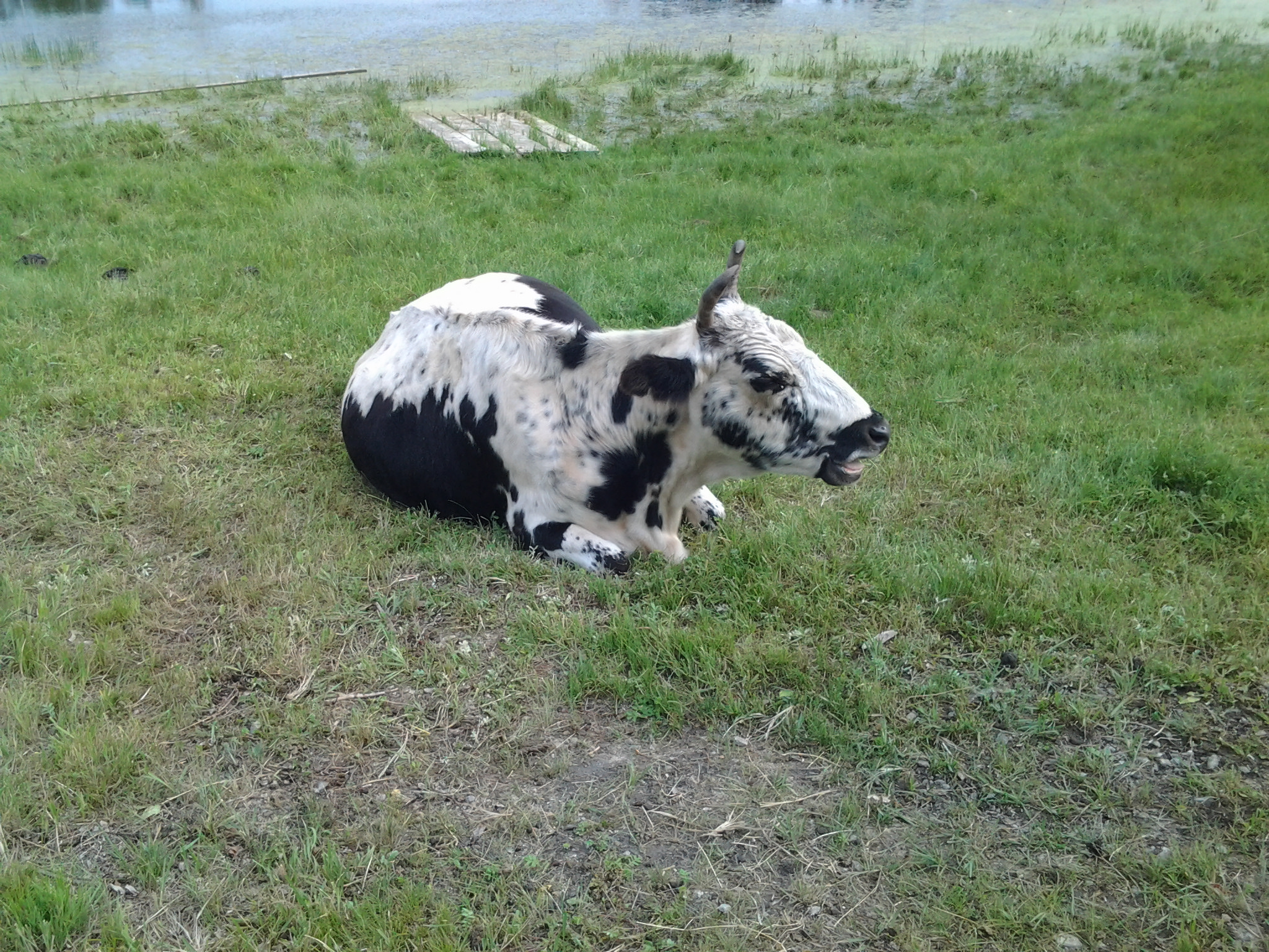 Саха тыла: Саха ынаҕа. "Орто дойду" зоопарка. 2012 сыл, от ыйа